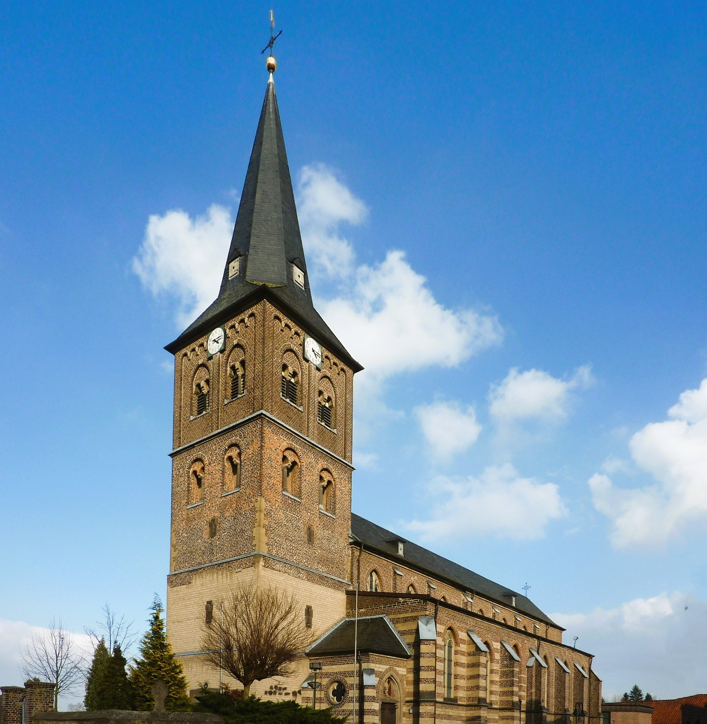 St. Martinus (Nettesheim)